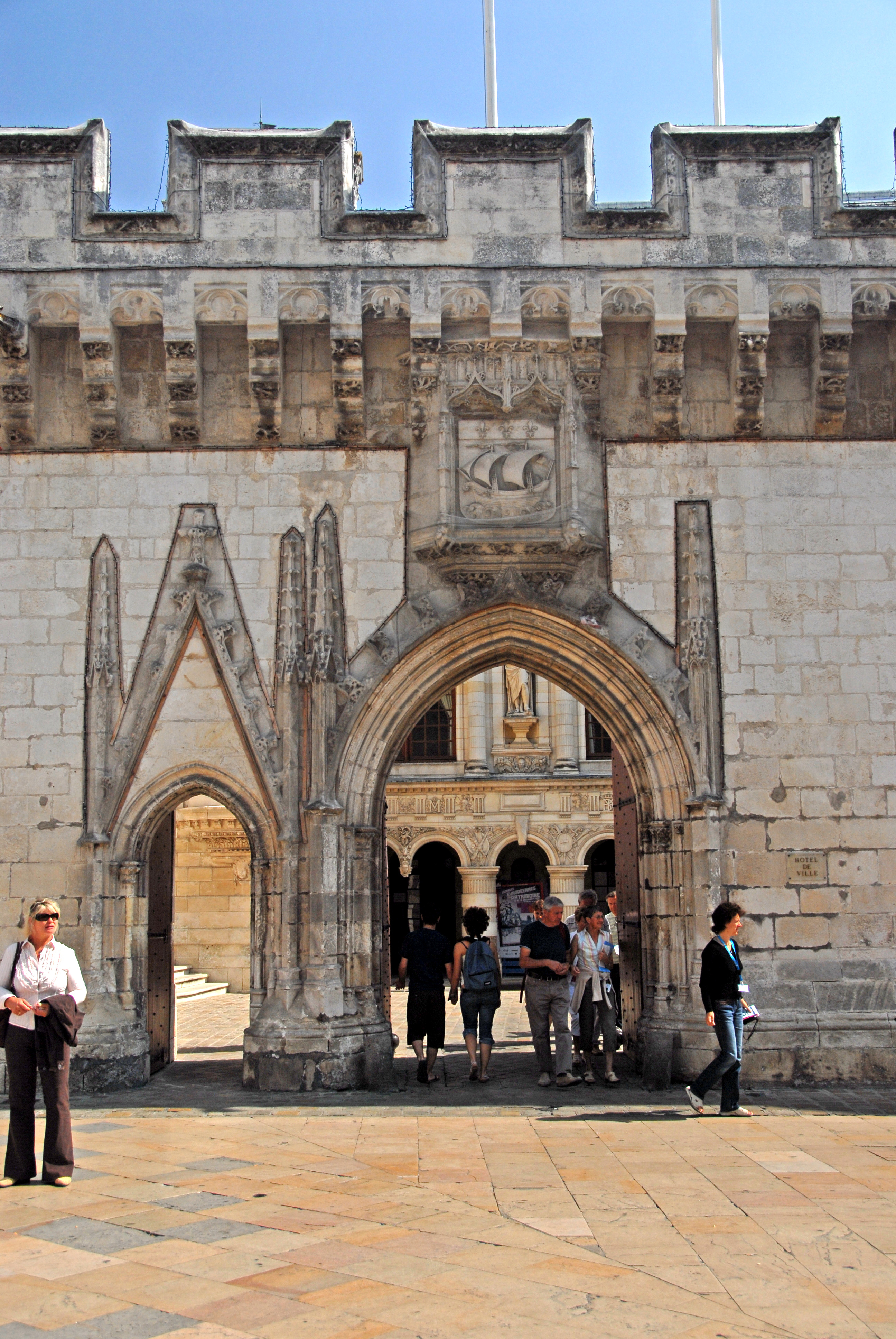 La Rochelle, Doppelportal Rathausmauer